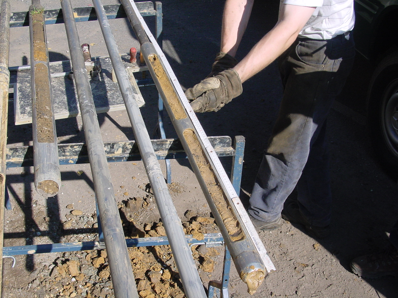 Sondierung im Bereich der ehemaligen Klosteranlage St. Aegidius in Aachen. (Sondiergestänge: Linke Bohrschappe mit Mutterboden und Kulturschutt, rechte Bohrschapppe mit Lösslehm)